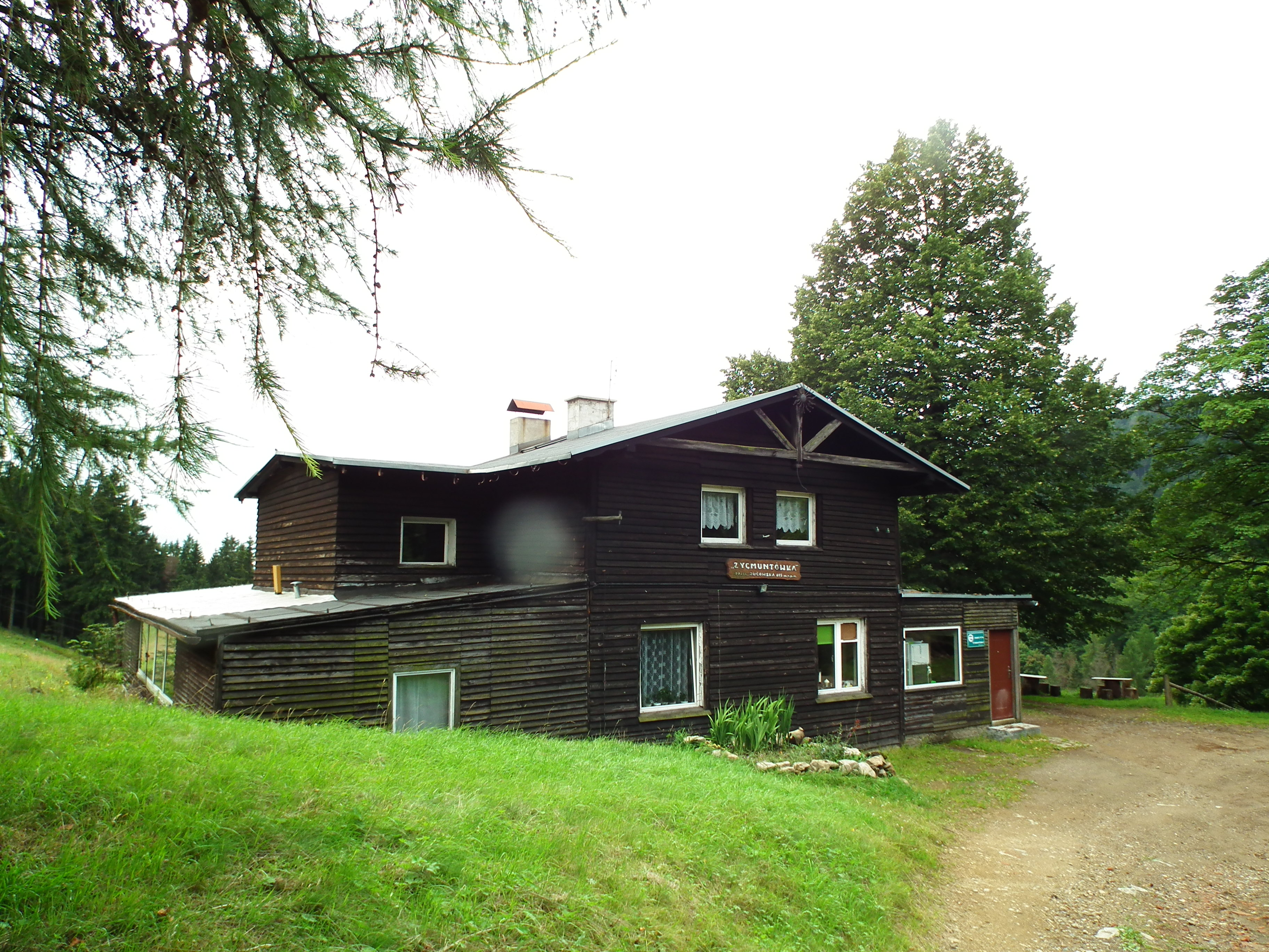 Schronisko PTTK Zygmuntówka w Górach Sowich.